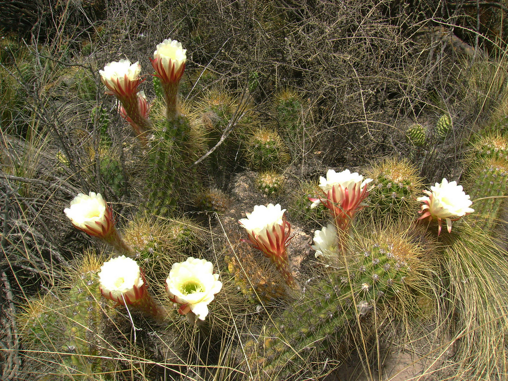 Echinopsis candicans. Primavera a los pies del Cerro Arco, Mendoza, Argentina